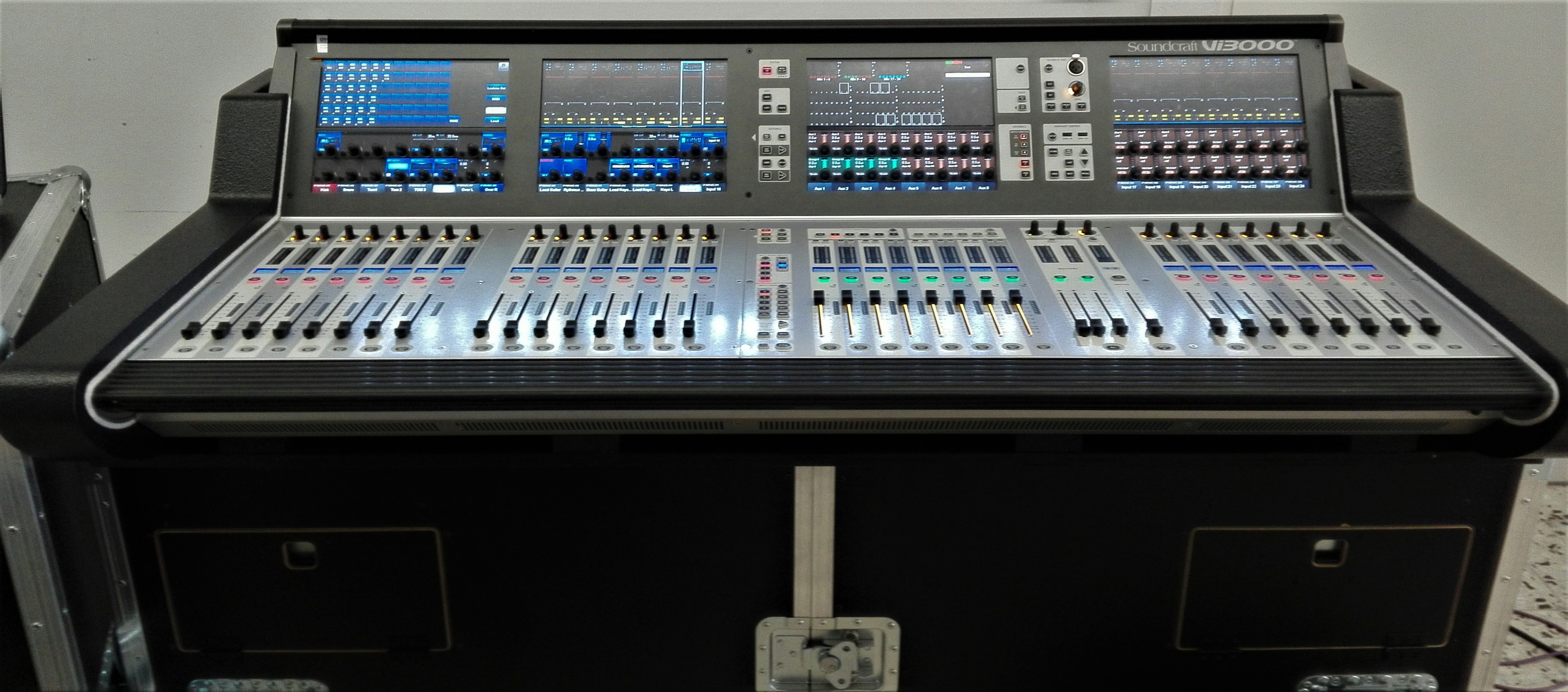 Digitales Mischpult nach einer Wartung